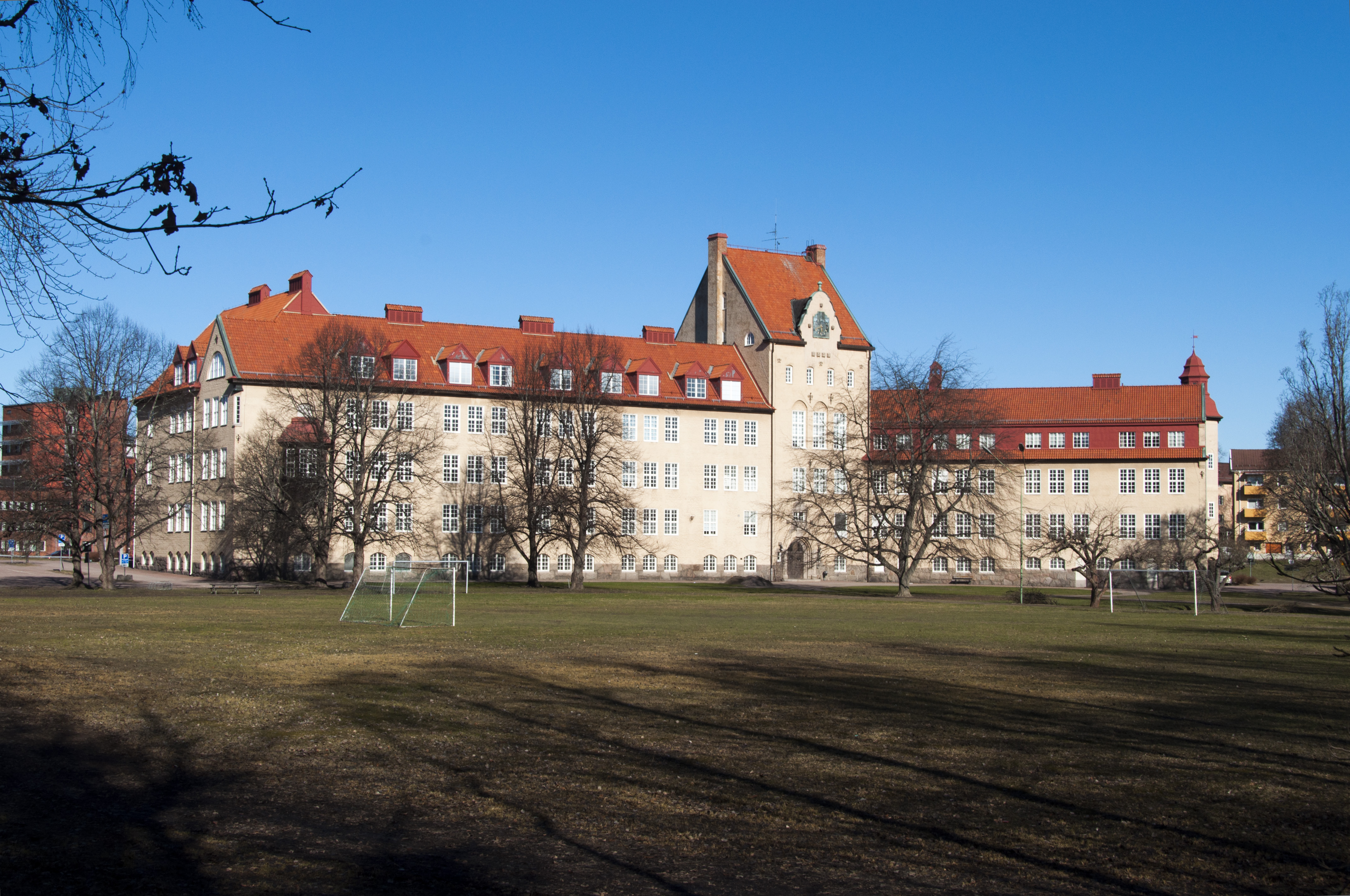 Gamla Seminariet i Karlstad, Byggår 1908-1920. Arkitekt Bror Almquist